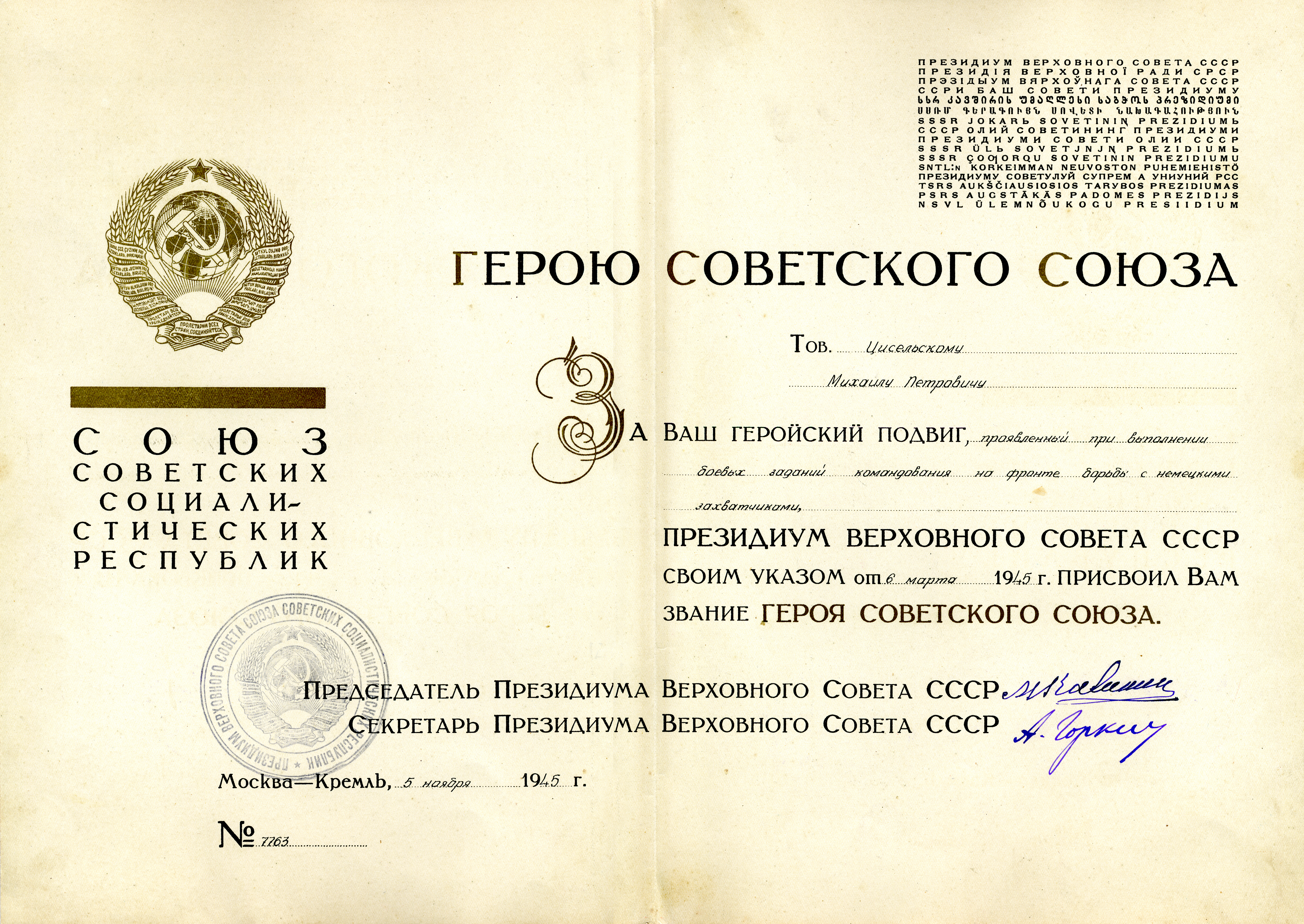 Отсканированный образ Грамоты Героя Советского Союза Цисельского М.П.